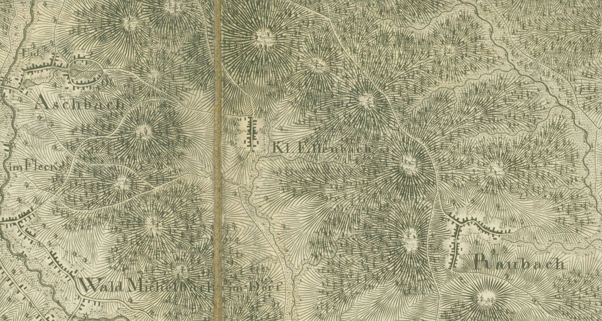 Auschnitt aus Blatt 19 der Haas´schen Karte mit dem Dorf Dürr-Ellenbach, dort noch Klein-Ellenbach genannt. ACHTUNG die Karte muss etwa 30° im Uhrzeigersinn gedreht werden, damit Norden oben ist.